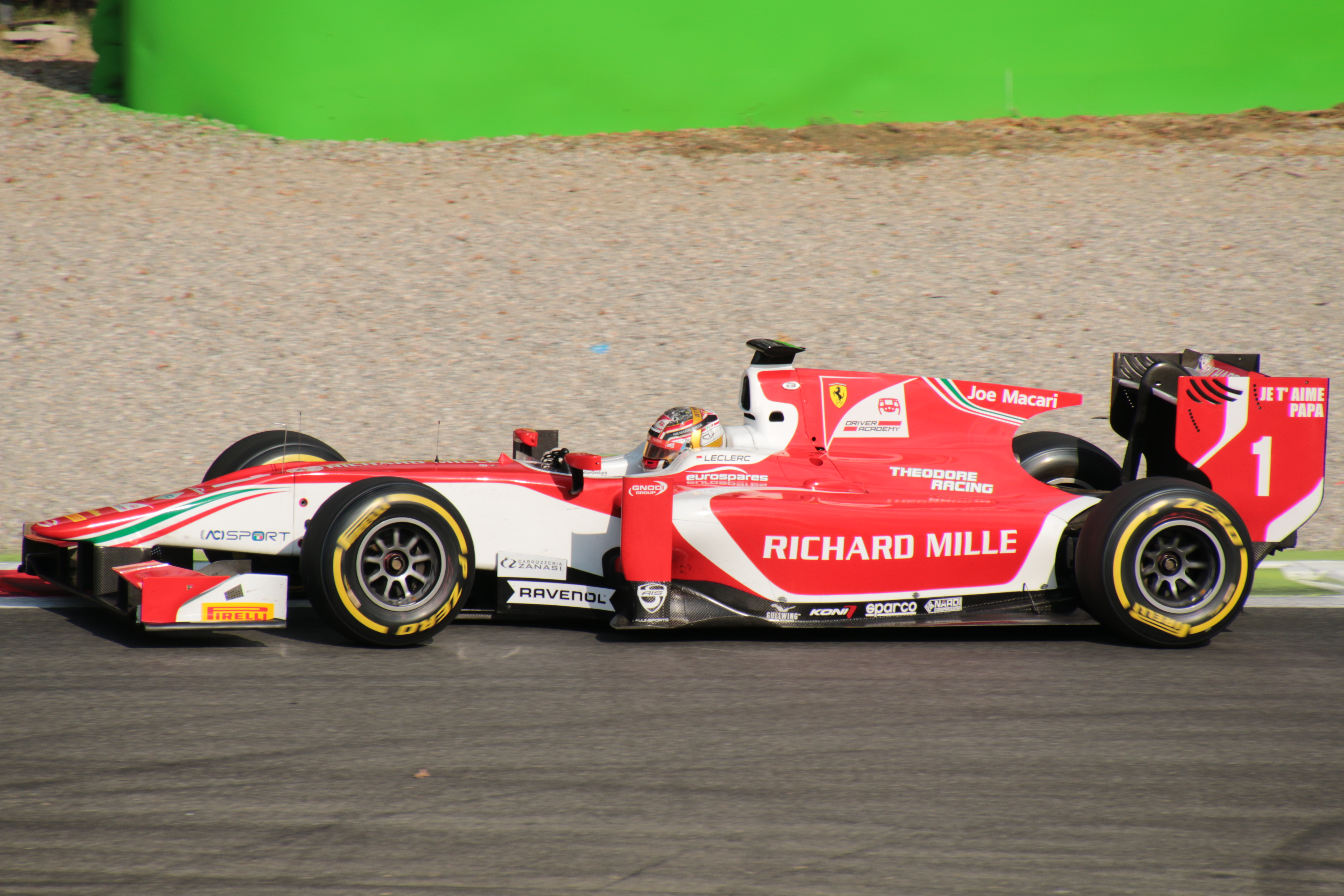 F2予選：シャルル